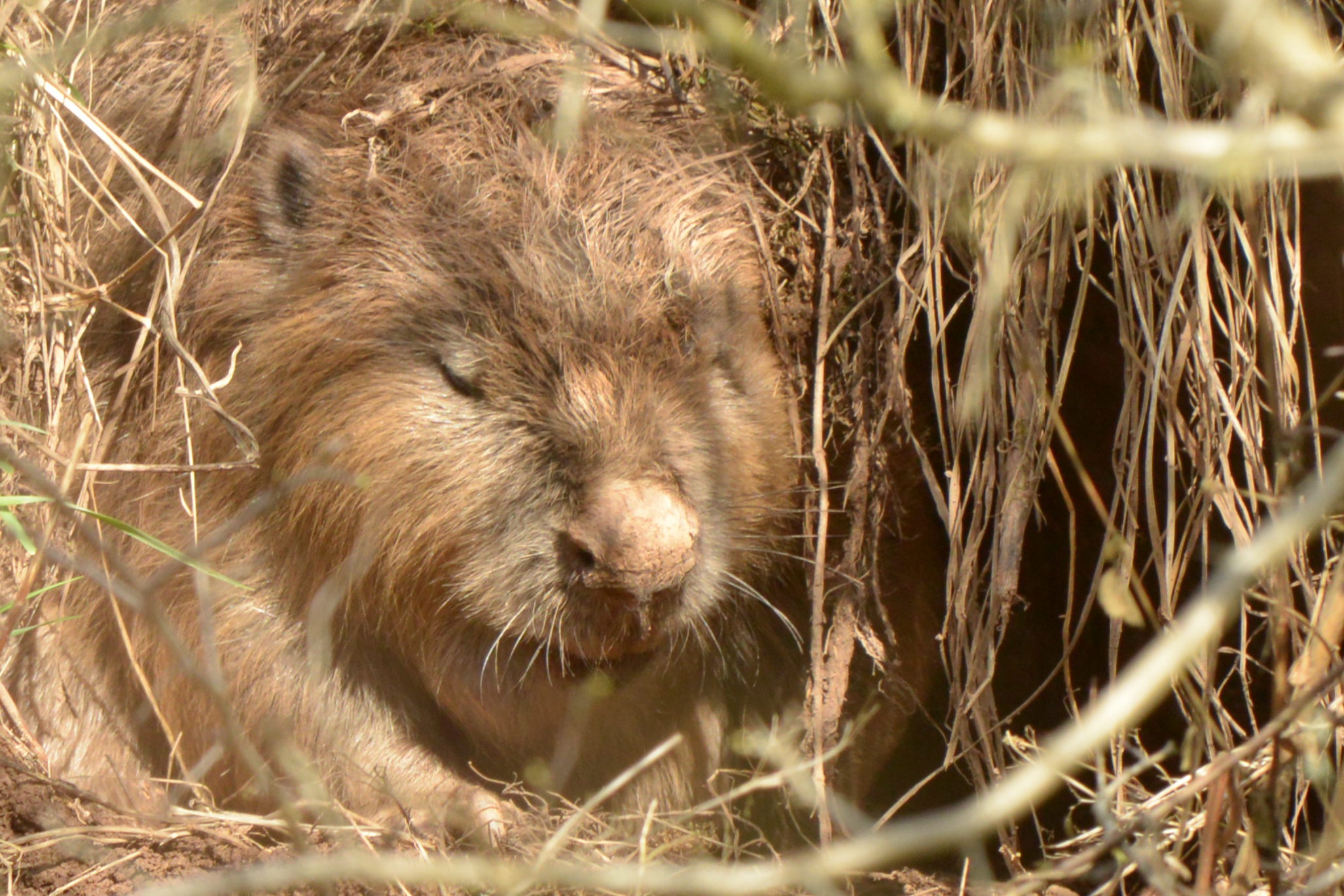 Biber (Merch)